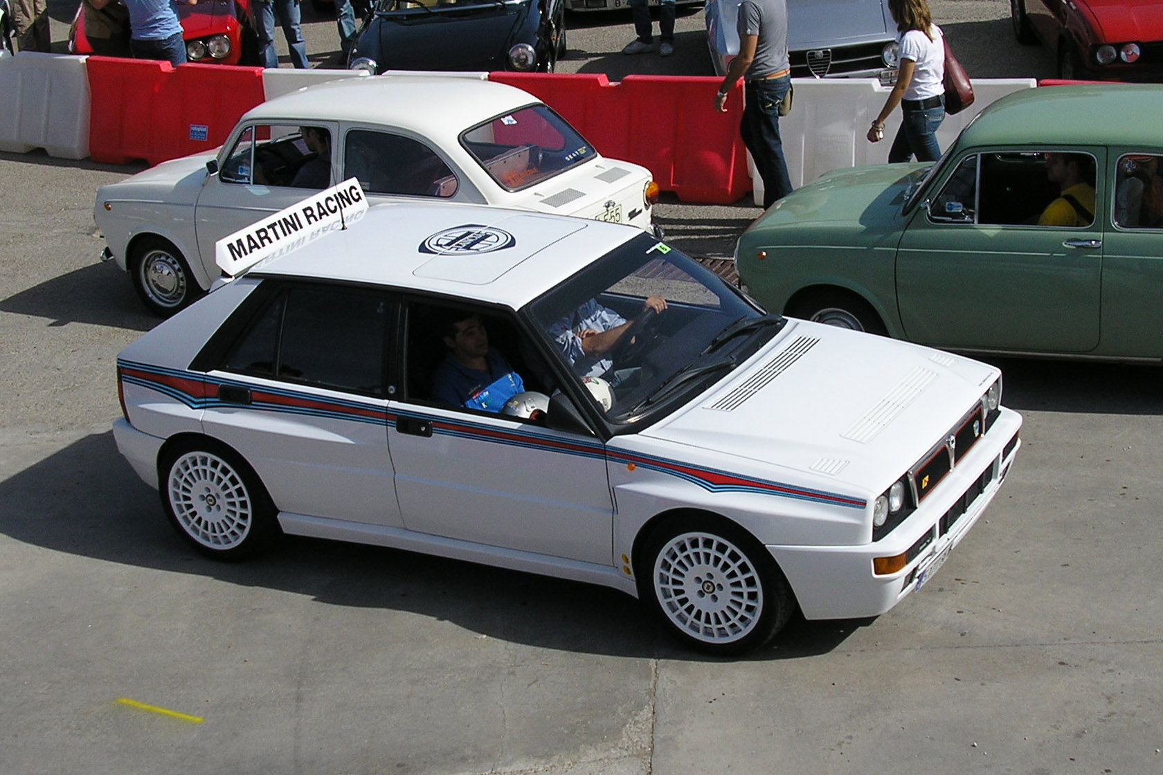 Lancia Delta shown in Circuito del Jarama (Madrid). Jornada de puertas abiertas 2006.